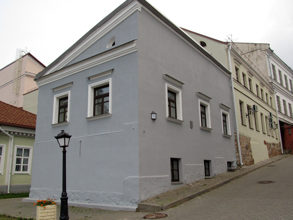 Мінск. Вуліца Інтэрнацыянальная, 33Б